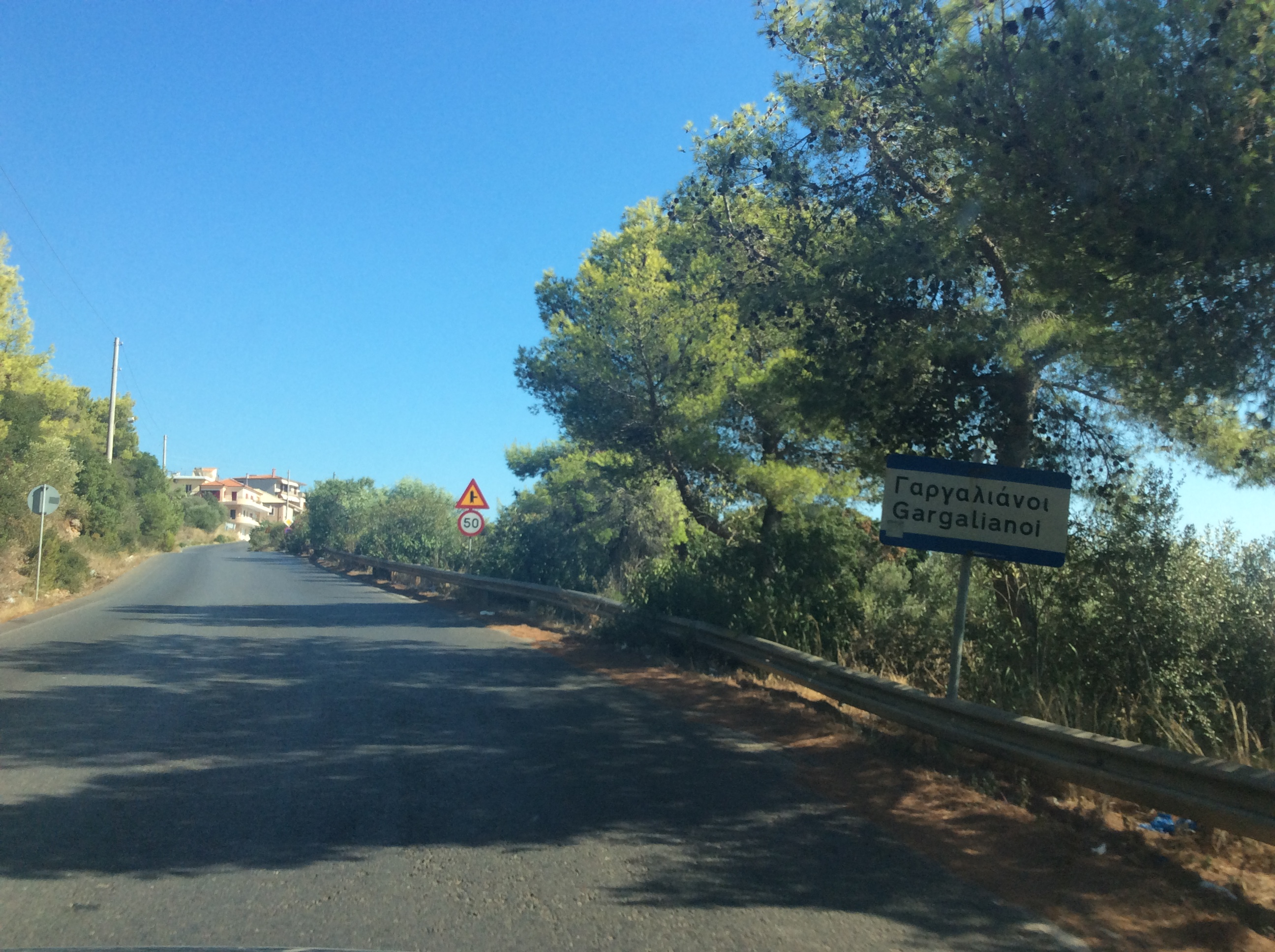 Γαργαλιάνοι Μεσσηνίας. Η βορειοδυτική κεντρική είσοδος στους Γαργαλιάνους.